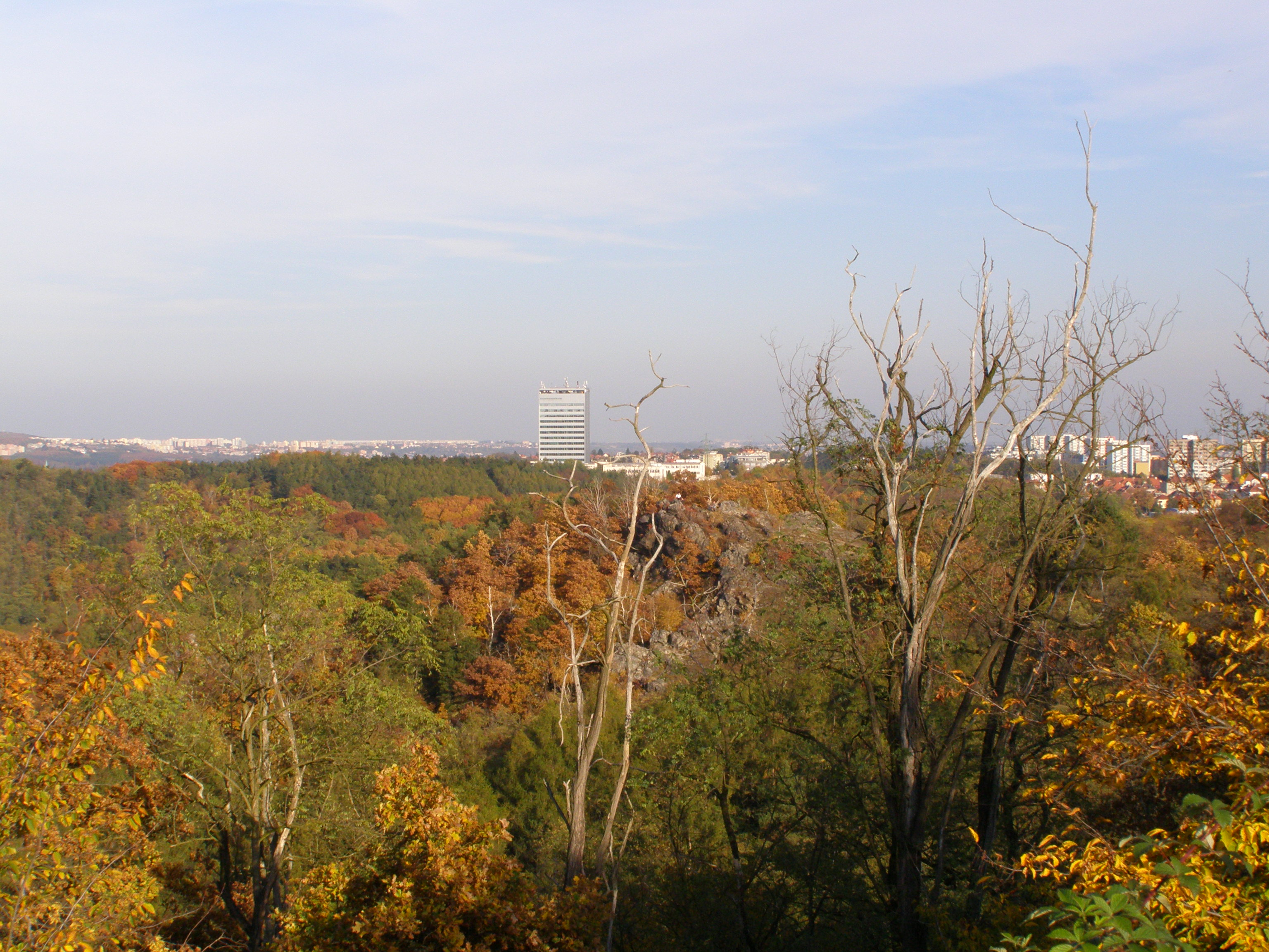 Praha, Přírodní park Šárka-Lysolaje